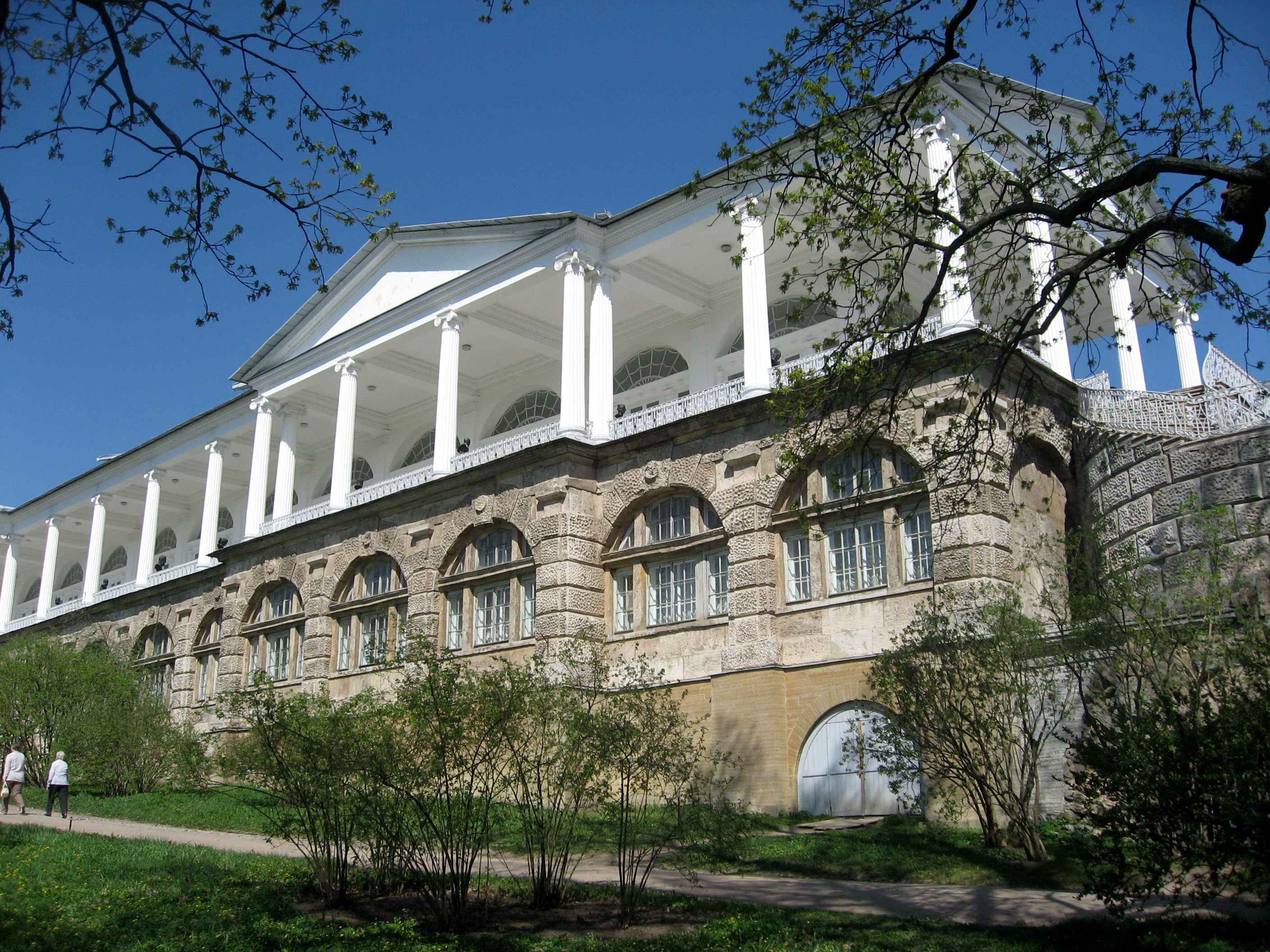 Kateřinský palác